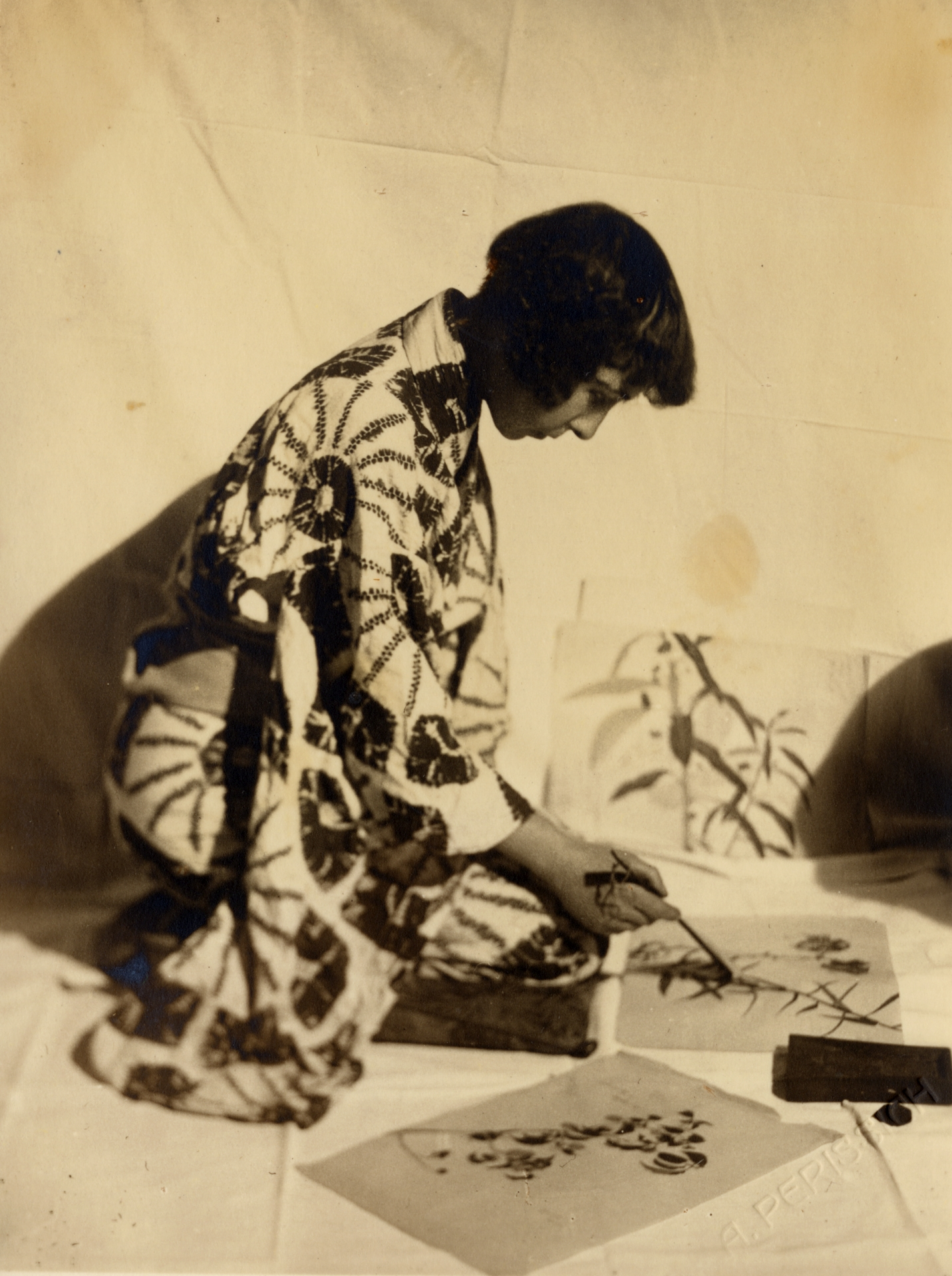 Alma Karlin v japonski noši